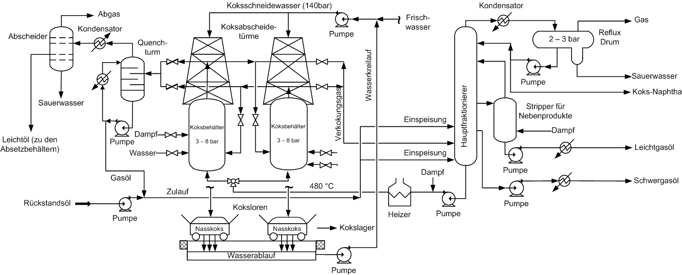 Crack-Prozess, Bild 1